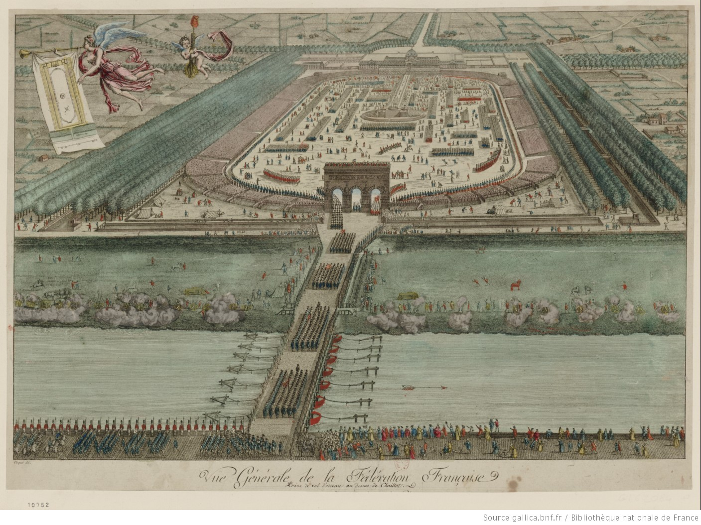 Gravure datée de 1790.